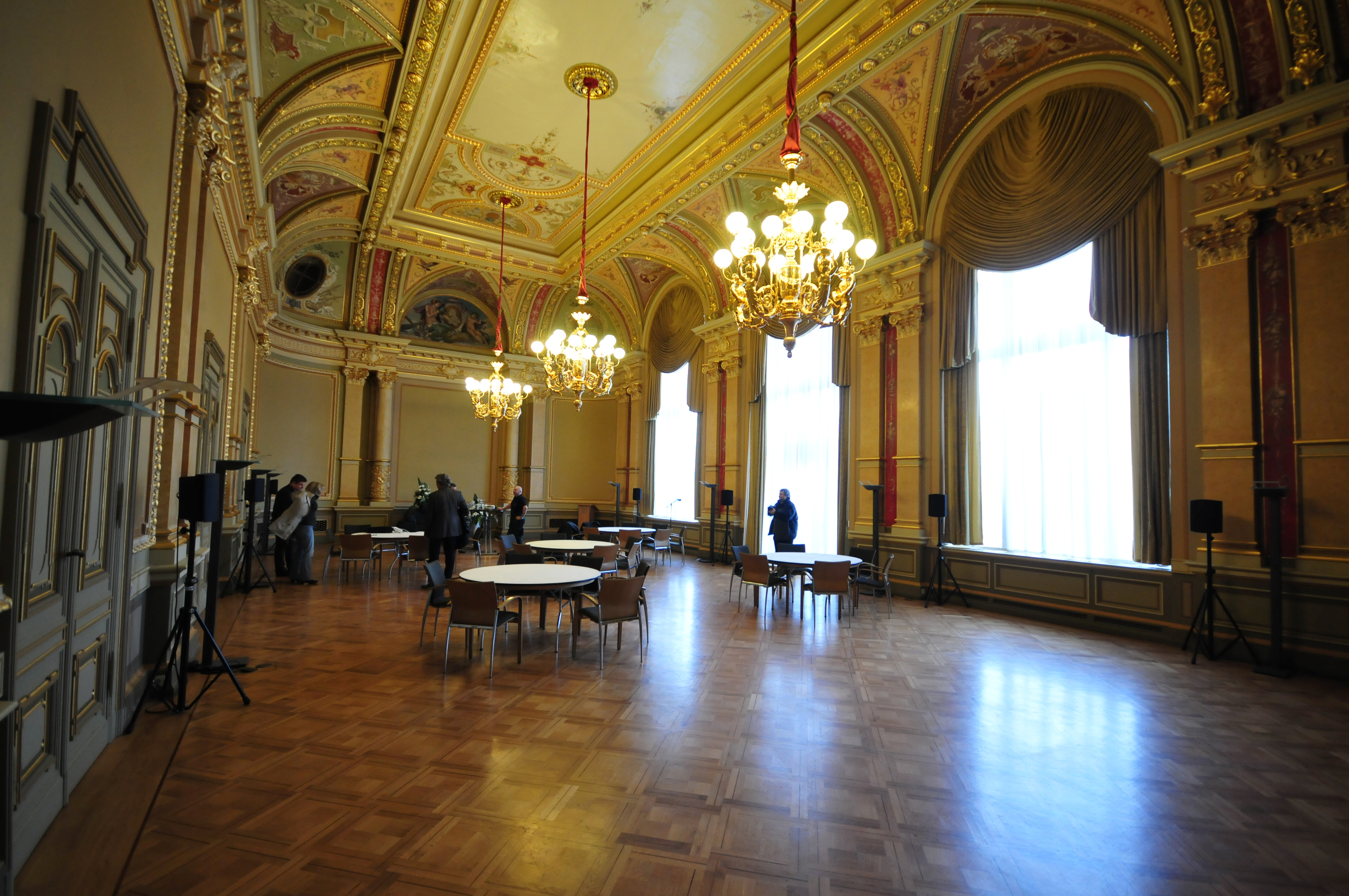 Staatskanzlei Sachsen-Anhalt im Palais am Fürstenwall Wikipedia im Landtag – Sachsen-Anhalt 13./14. Dezember 2012 in Magdeburg Dieses Foto wurde im Rahmen des Projektes „Wikipedia im Landtag“ erstellt. The making of this document was supported by the Community-Budget of Wikimedia Germany. The making of this document was supported by Wikimedia Austria.